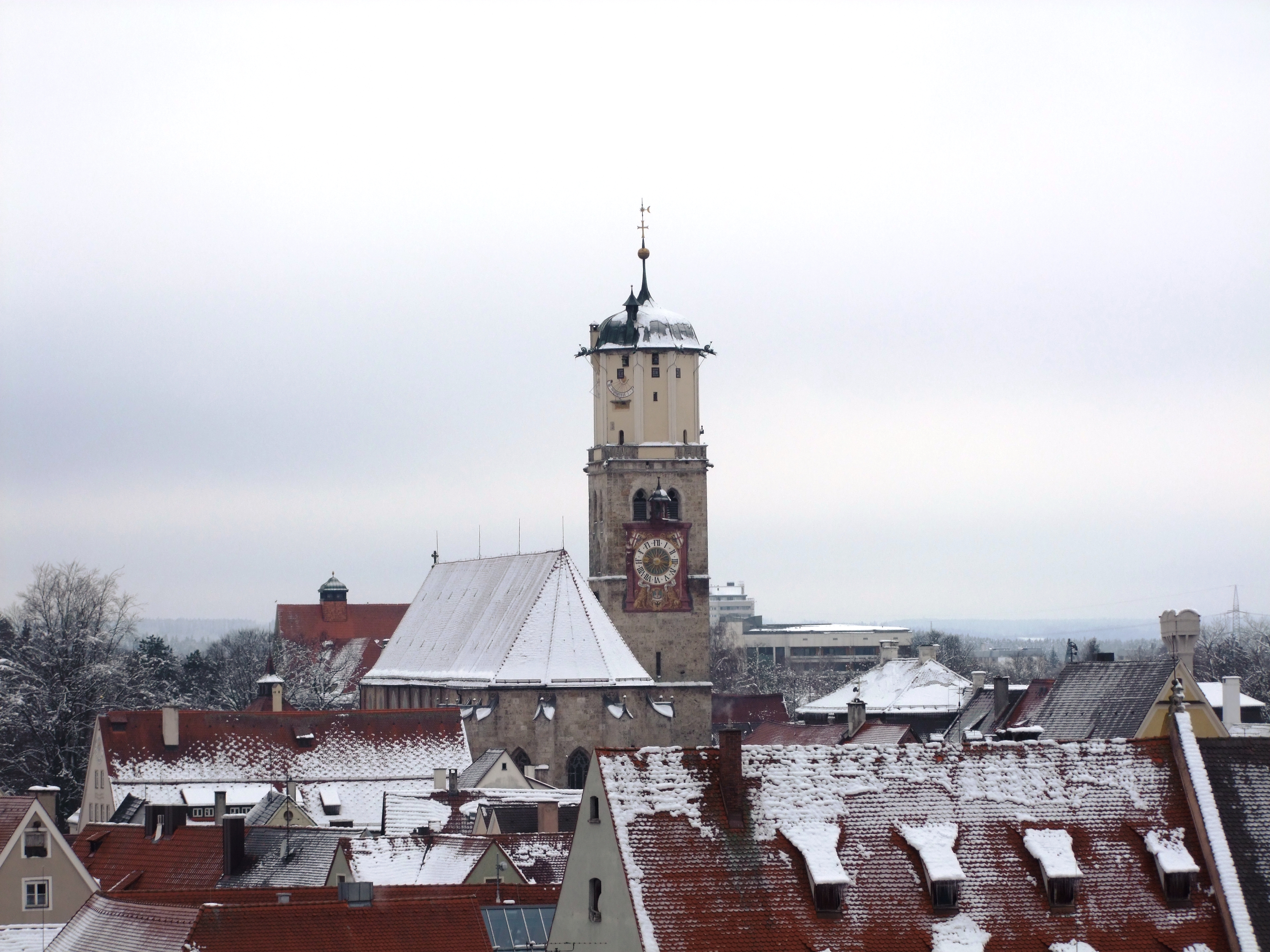 Stadtansicht im Winter, St. Martin